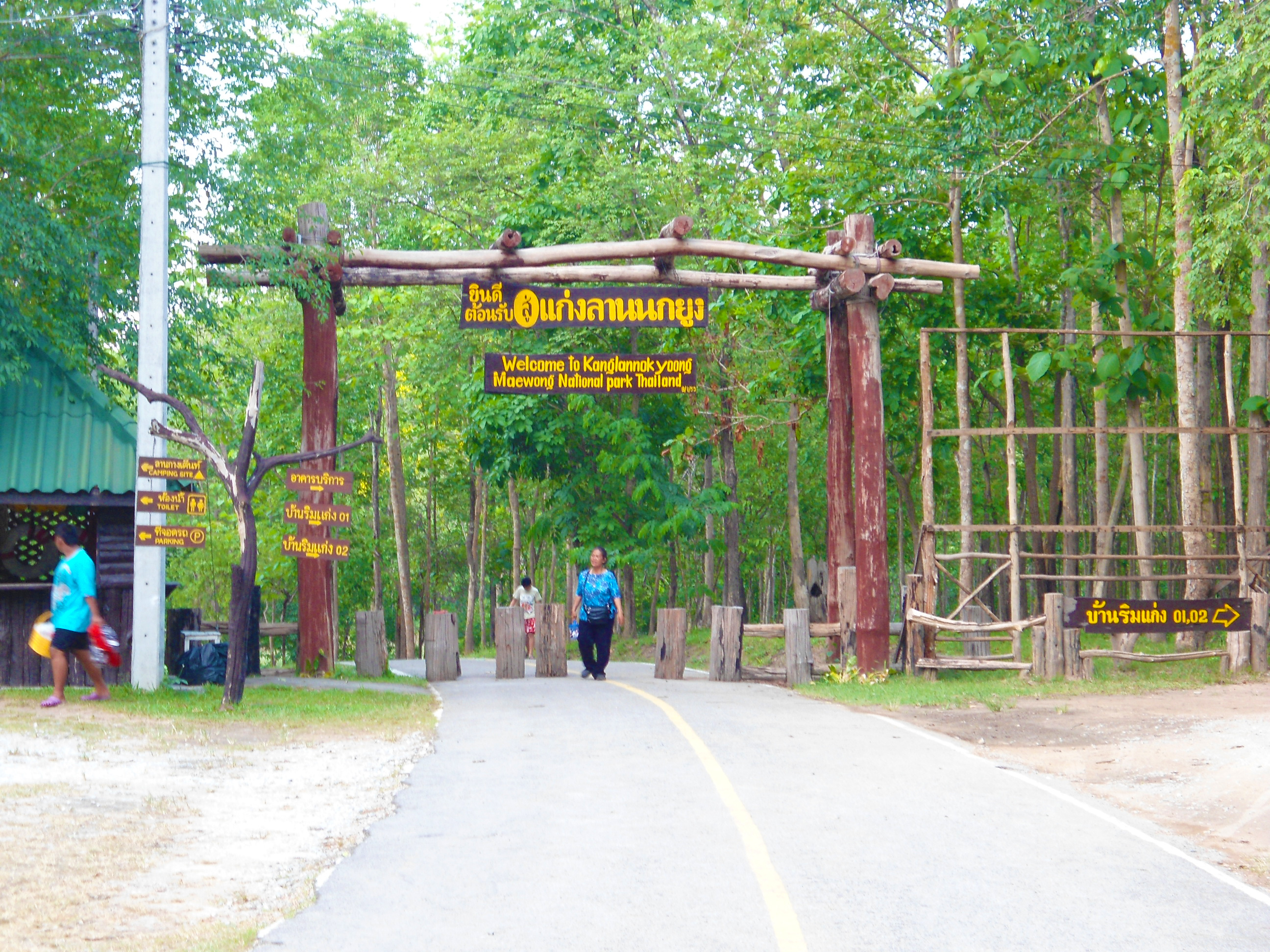 ป้ายด้านหน้าแก่งนกยูง หน่วยพิทักษ์อุทยานแห่งชาติแม่วงก์ ที่ มว.4 (แม่เรวา) อำเภอแม่วงก์ จังหวัดนครสวรรค์